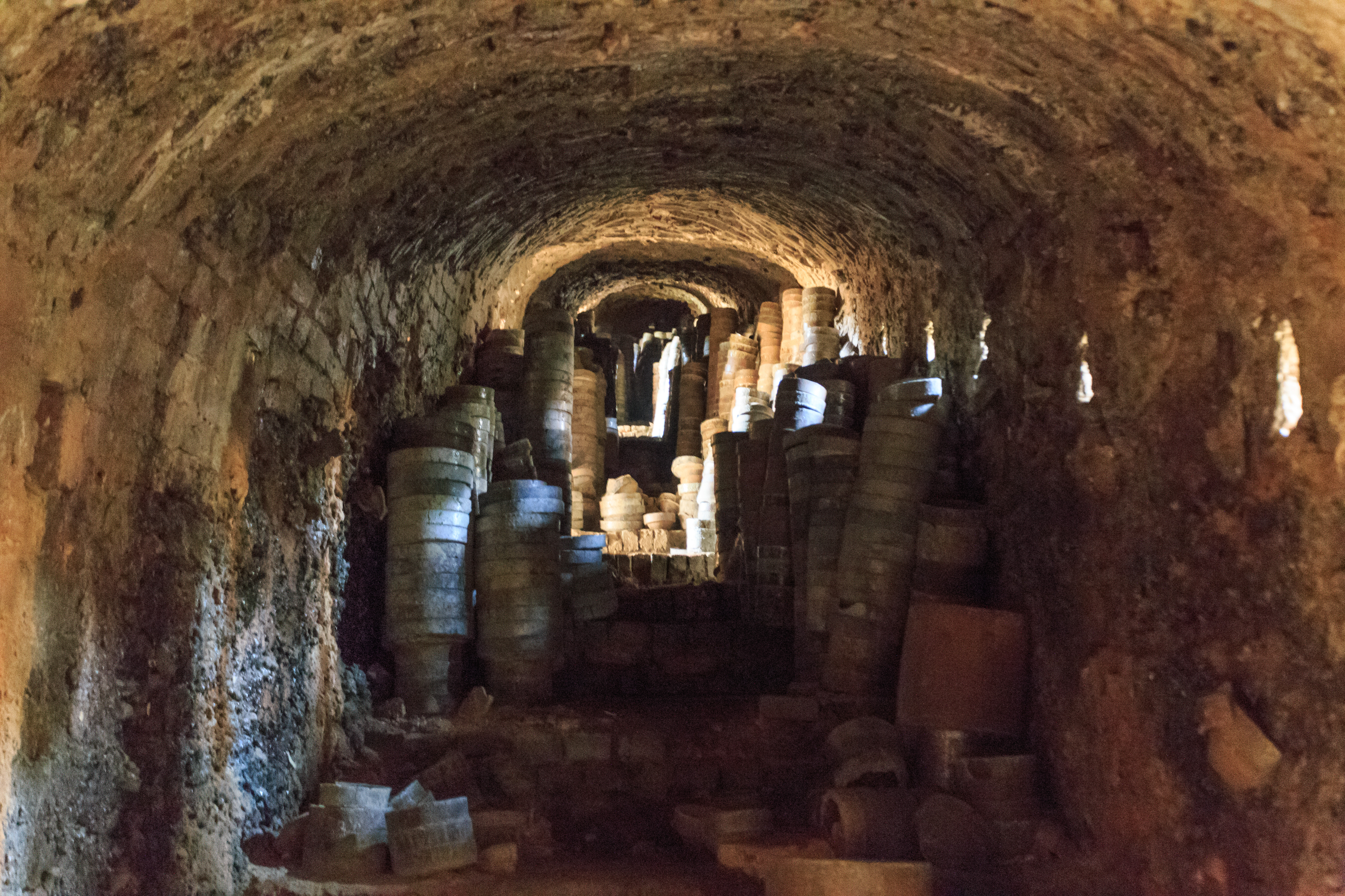 三卿口制瓷作坊 龙窑内部